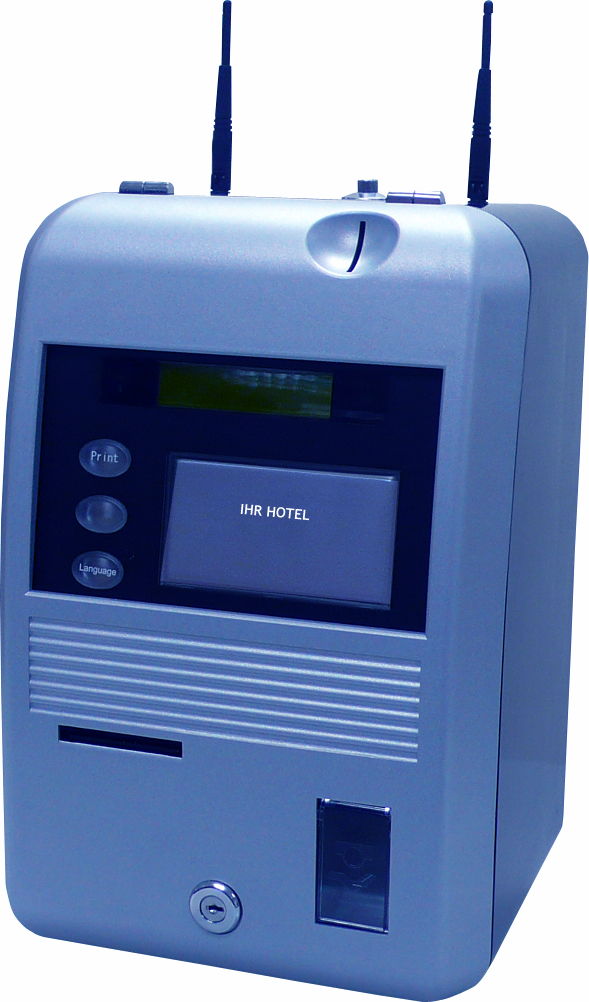 Coin2Web (RubyTech) Münz-HotSpot